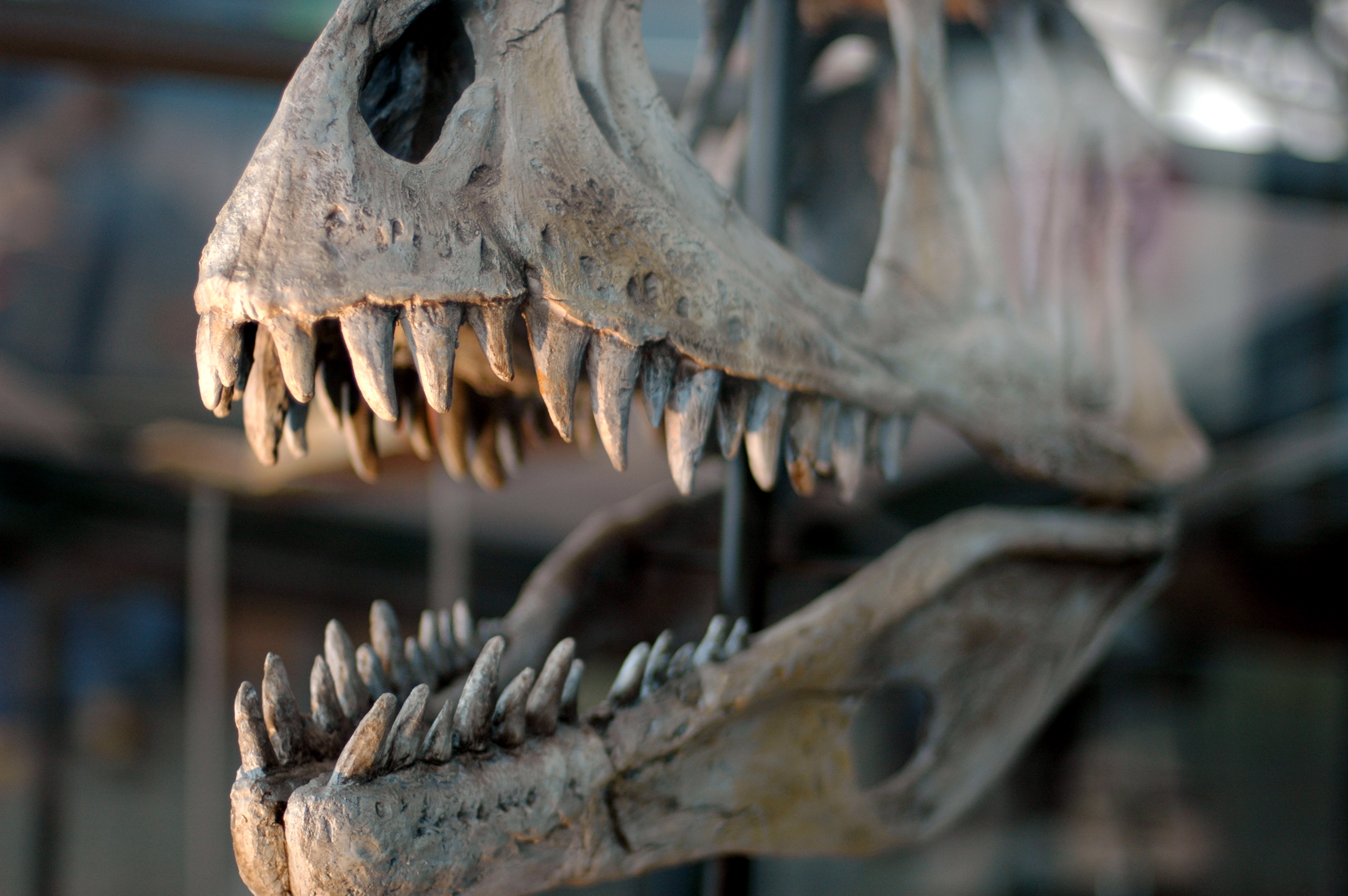 Dinosaur Skull